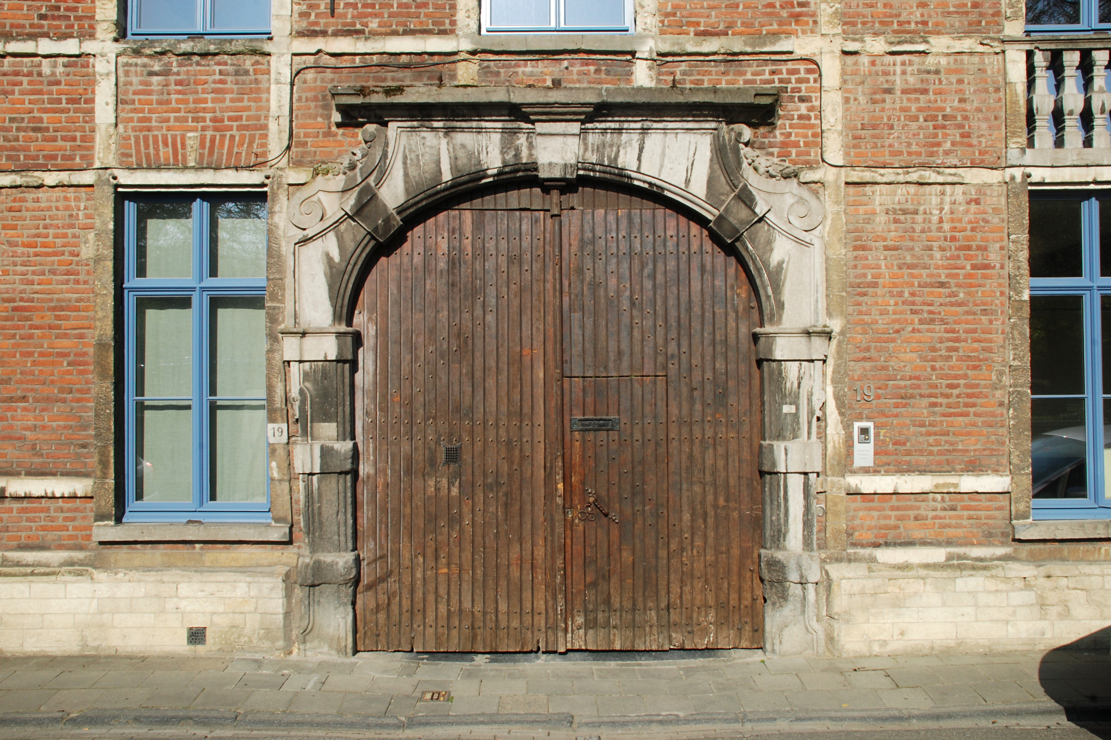 Belgique - Louvain - Brasserie de Jonge Sint-Jacob